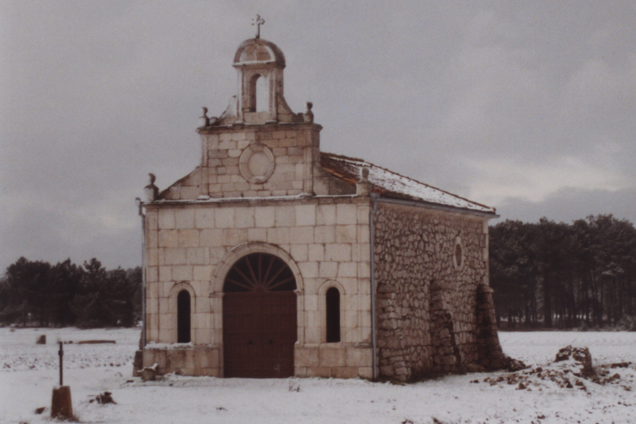 Ermita del municipio de Camporredondo, en la provincia de Valladolid (España). El paisaje está copiosamente nevado.